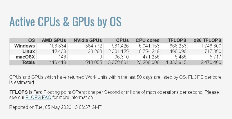 Número e tipo de dispositivos trabalhando no sistema.